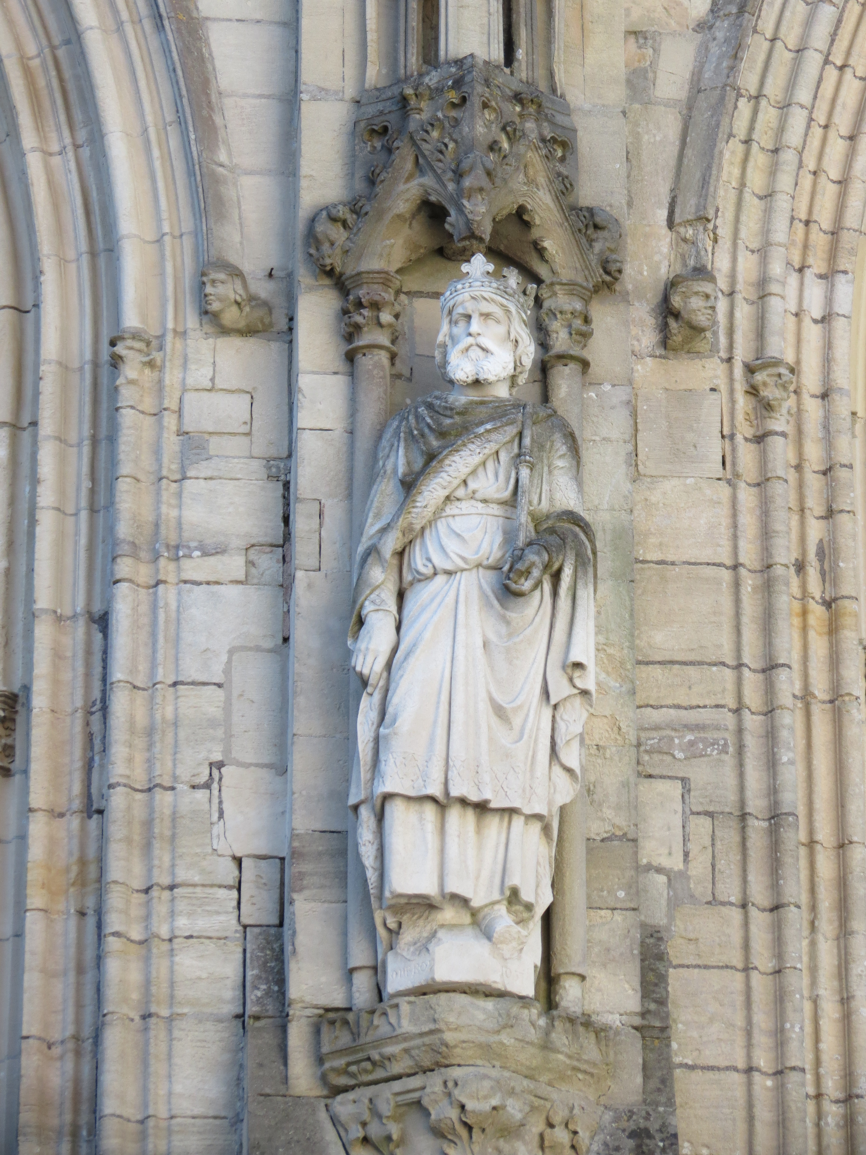 Statue de Onfroi de Hauteville datant de 1875, remplaçant celle abîmée à la Révolution.